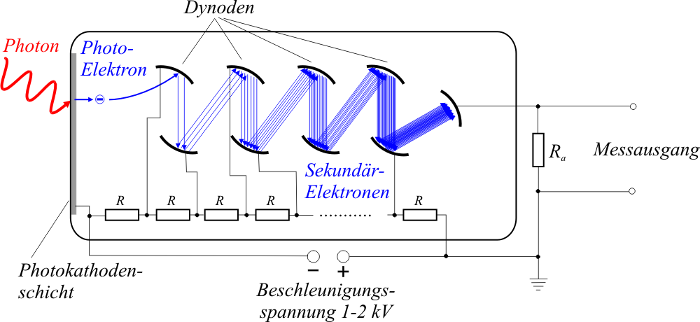 Photomultiplier